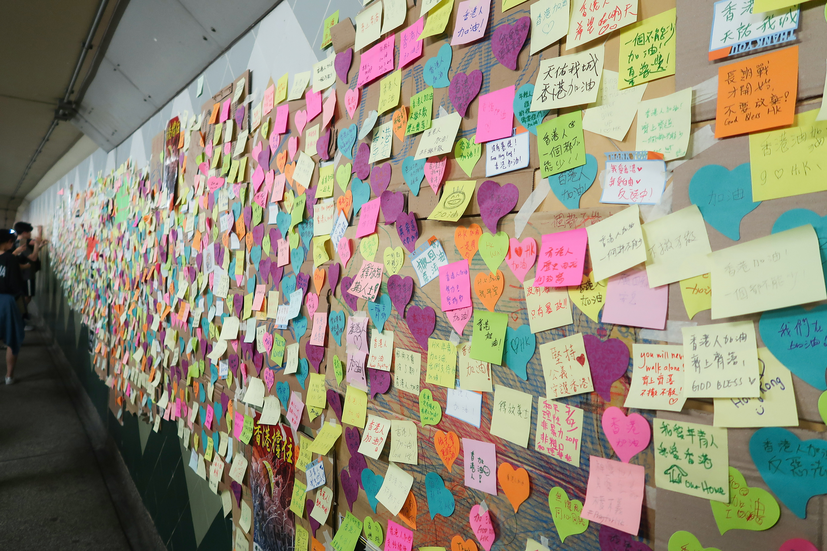 Lennon Wall in Jordan Road tunnel